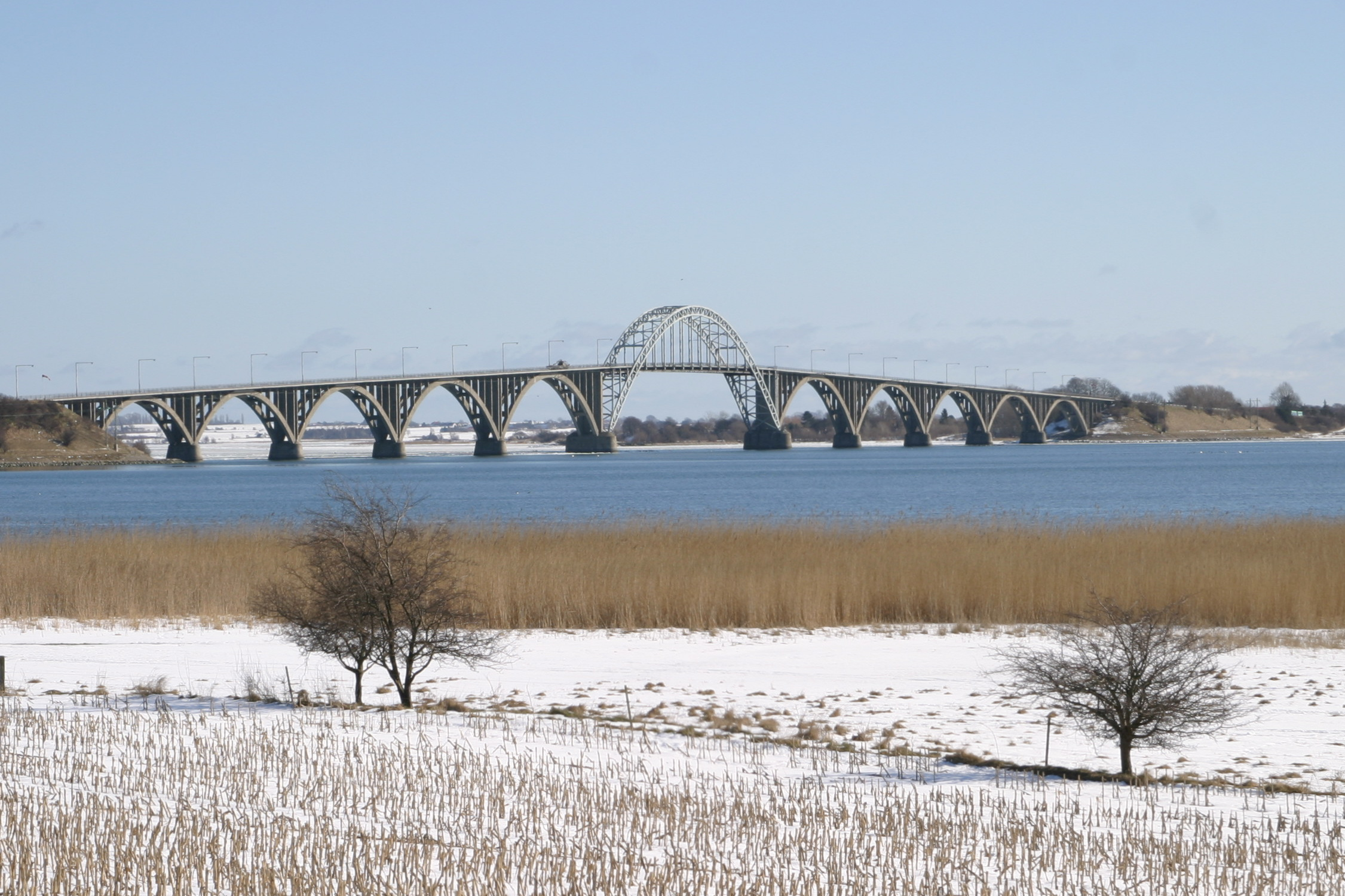 Dronning Alexandrines bro der forbinder Sjælland og Møn